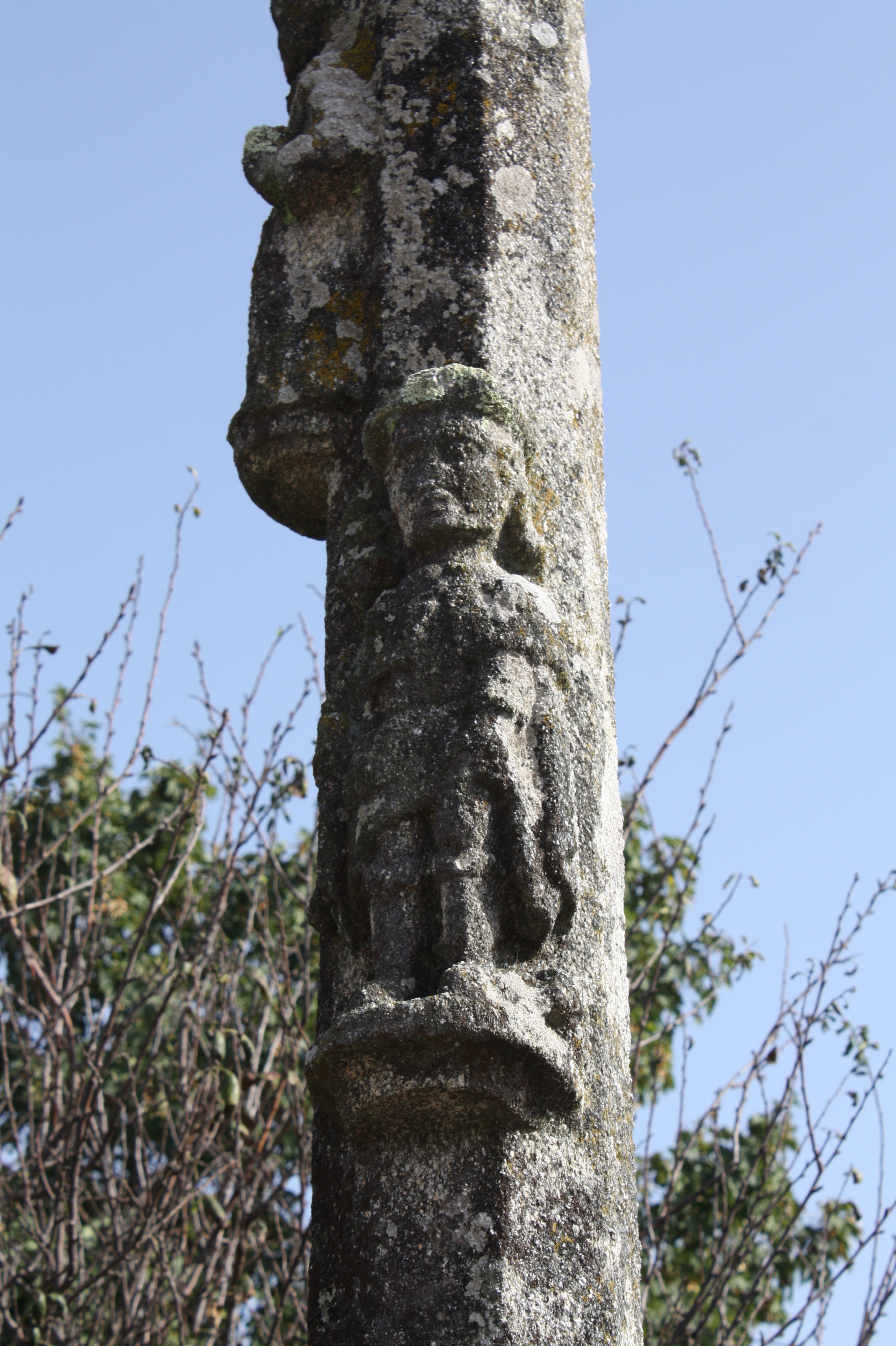 Figura no fuste dun cruceiro do lugar de Lourido, na parroquia de Castrelo (Cambados, Pontevedra)